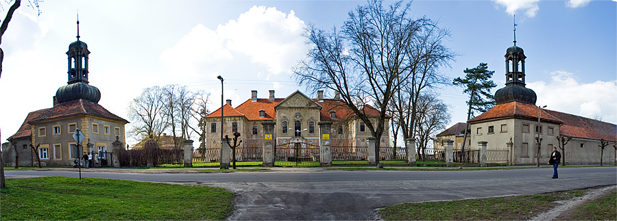 Zespół pałacowy w Bojadłach. Zabytek nr rej. 205 z 20.03.1961.